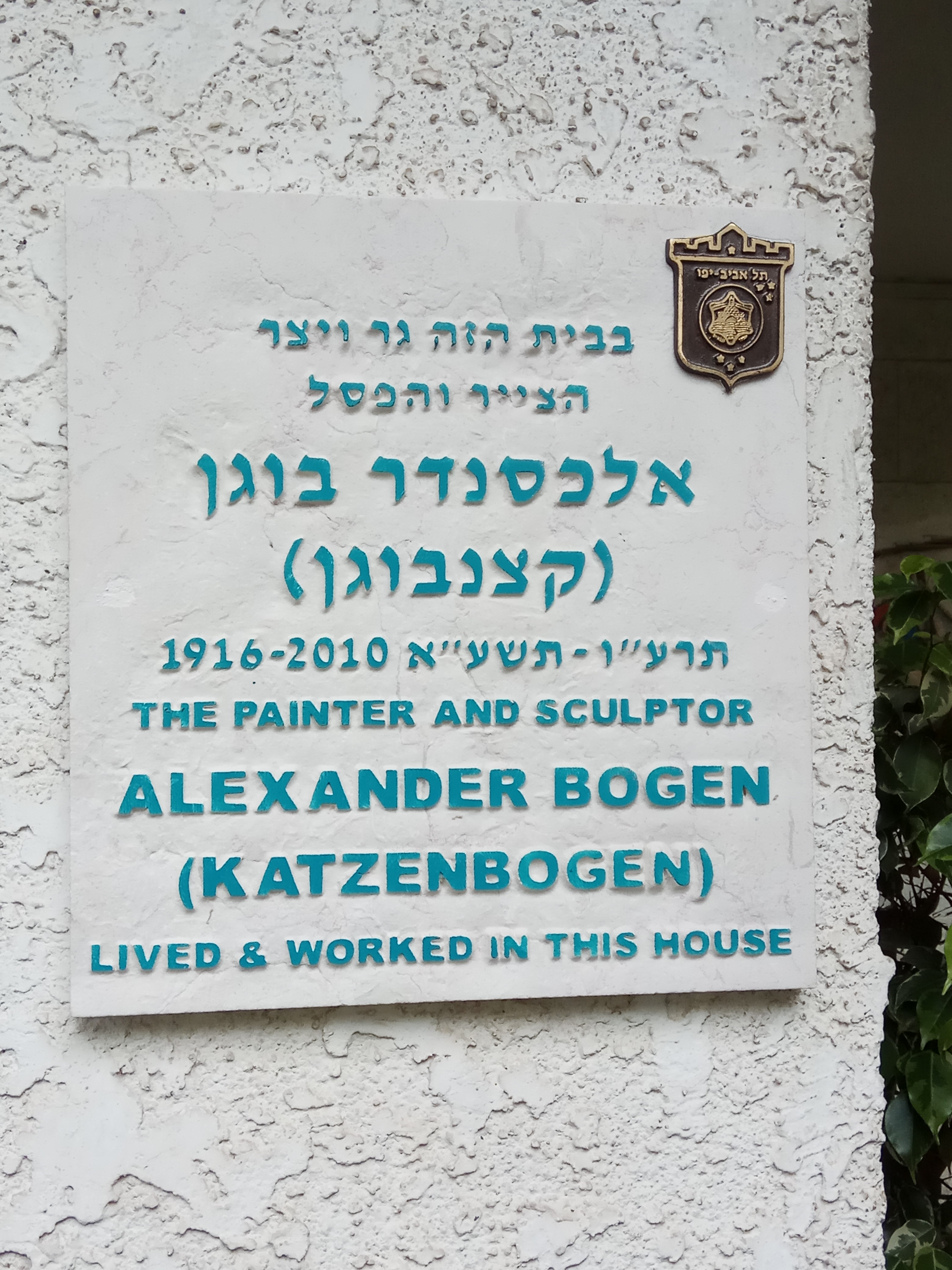 לוחית זיכרון לצייר והפסל אלכסנדר בוגן בכניסה לביתו ברחוב אבן שפרוט 7 בתל אביב